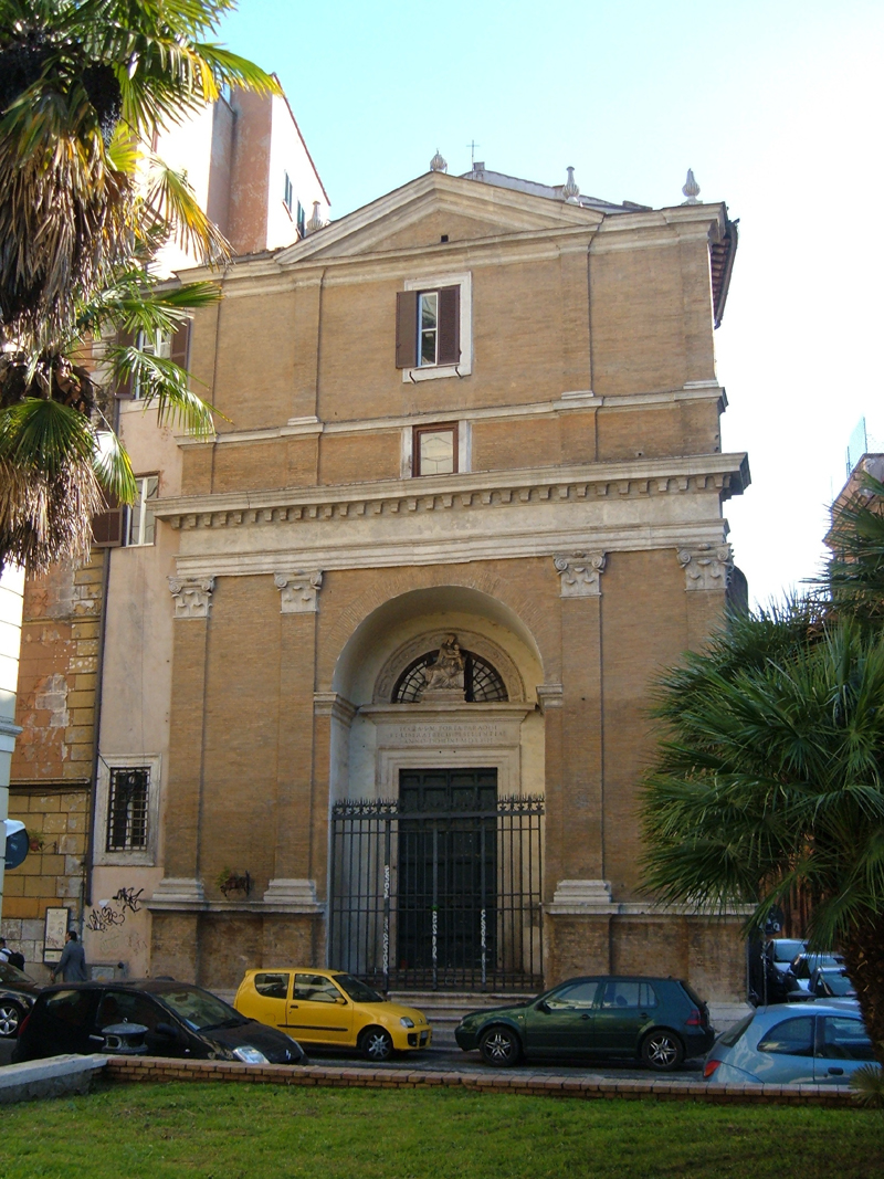 Chiesa di Santa Maria Portae Paradisi, a Roma, nel rione Campo Marzio. Foto personale.